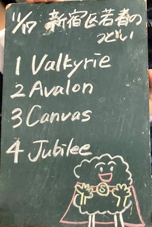 amiinAセトリボード(20181117(1))